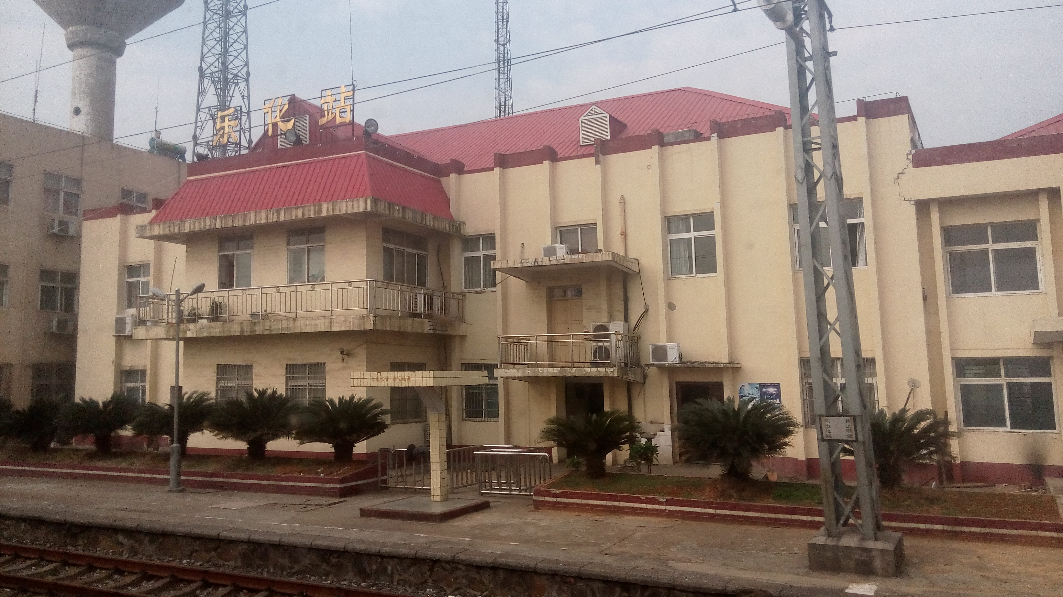 乐化站 站房